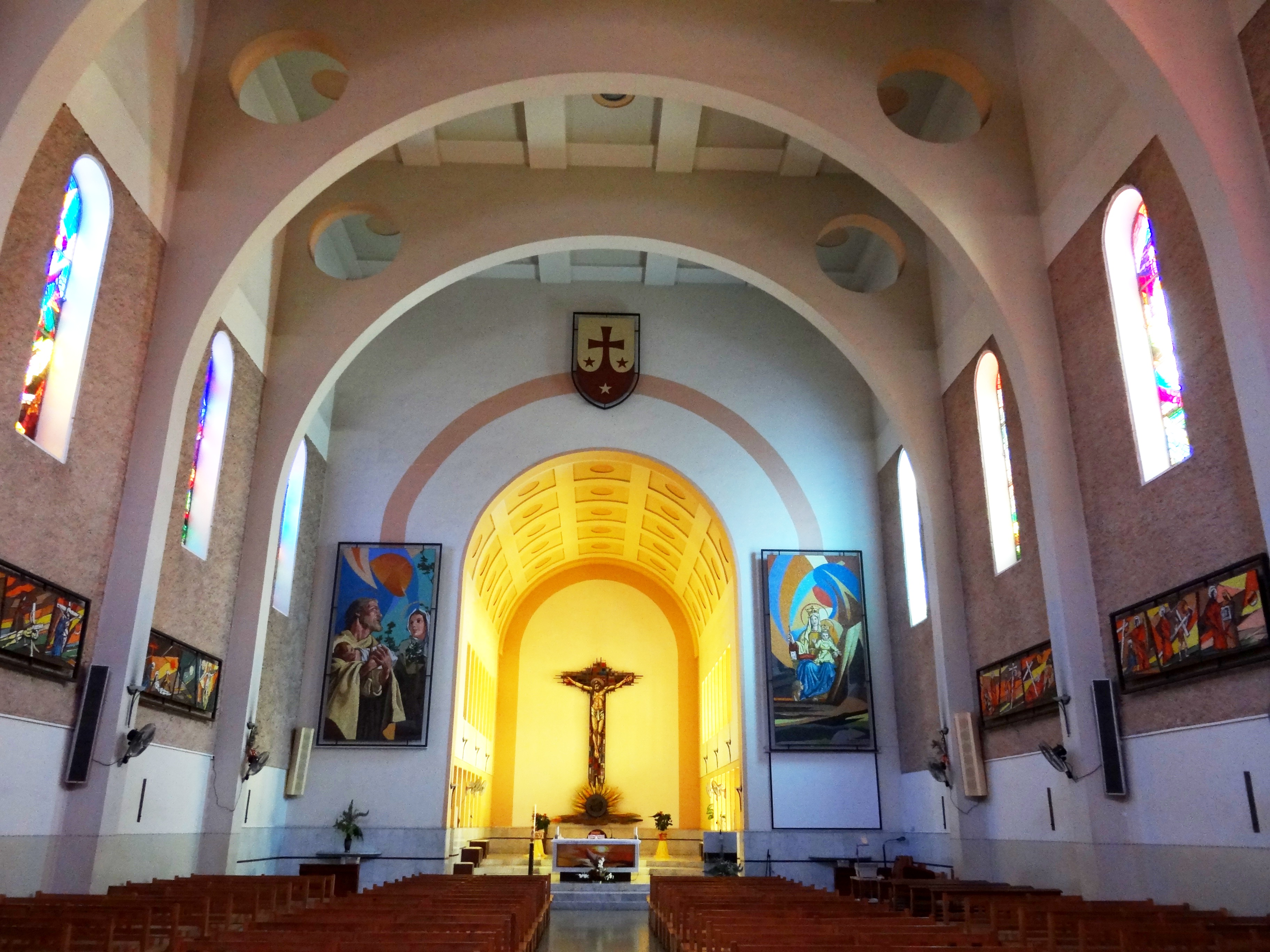 Saint Joseph's Latin Parish, Haifa Israel סיינט גוזף, הכנסייה הלטינית, שוכנת בחיפה בשדרות המגינים. מבני הקהילה כוללים ברת בית הספר כרמל בשדרות המגינים 76, מבנה הכנסייה בשדרות המגינים 78, ומבנה הקהילה בשדרות המגינים 80 אולם הכנסייה מבפנים